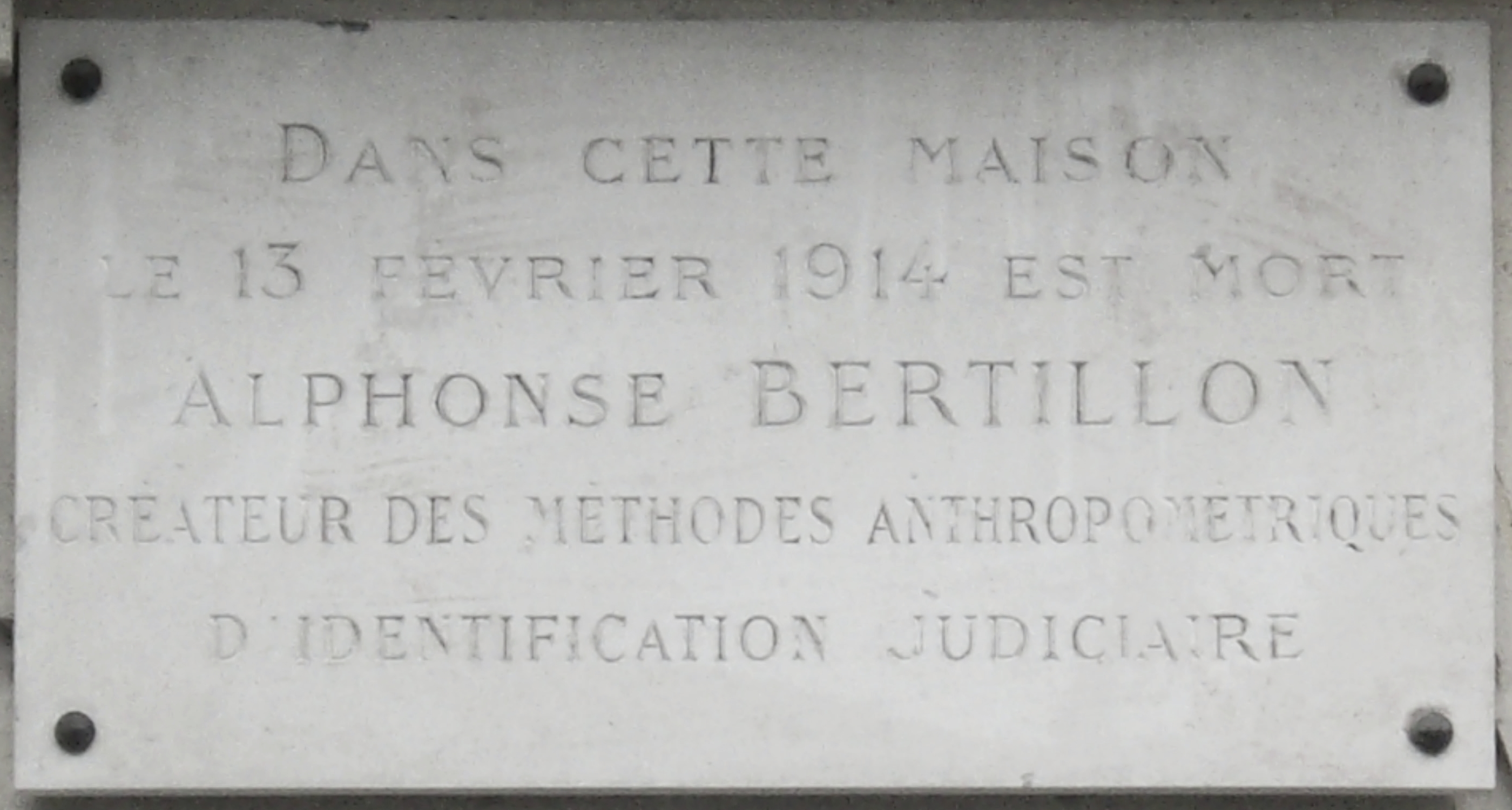 Plaque commémorative, 5 avenue du Président-Wilson, Paris 16e. « Dans cette maison, le 13 février 1914, est mort Alphonse Bertillon, créateur des méthodes anthropométriques d'identité judiciaire. »